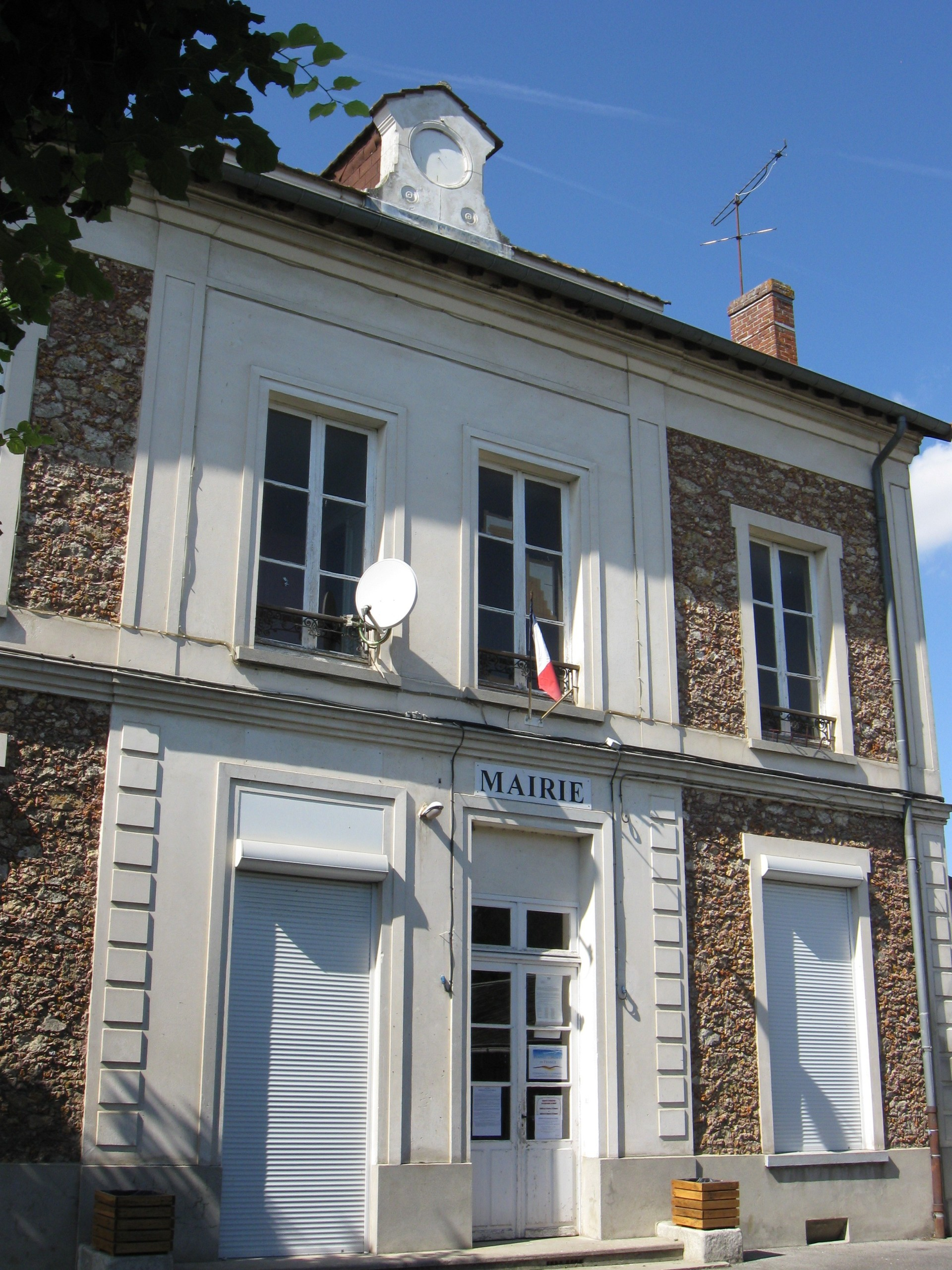 Mairie de Charmentray. (Seine-et-Marne, région Île-de-France).